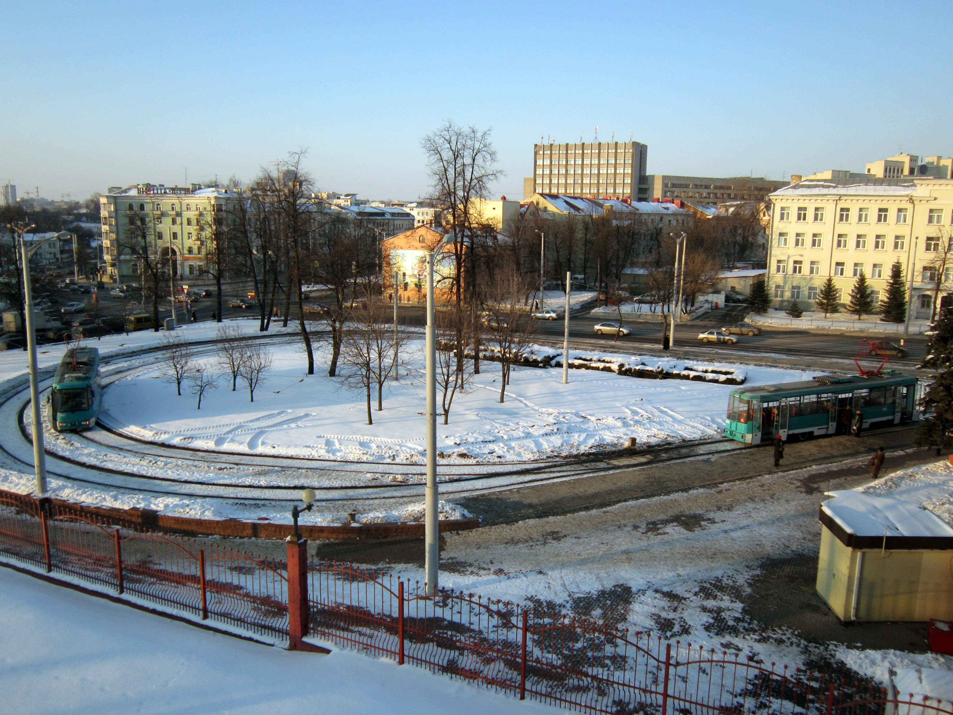 Трамвайное кольцо "Площадь Мясникова"